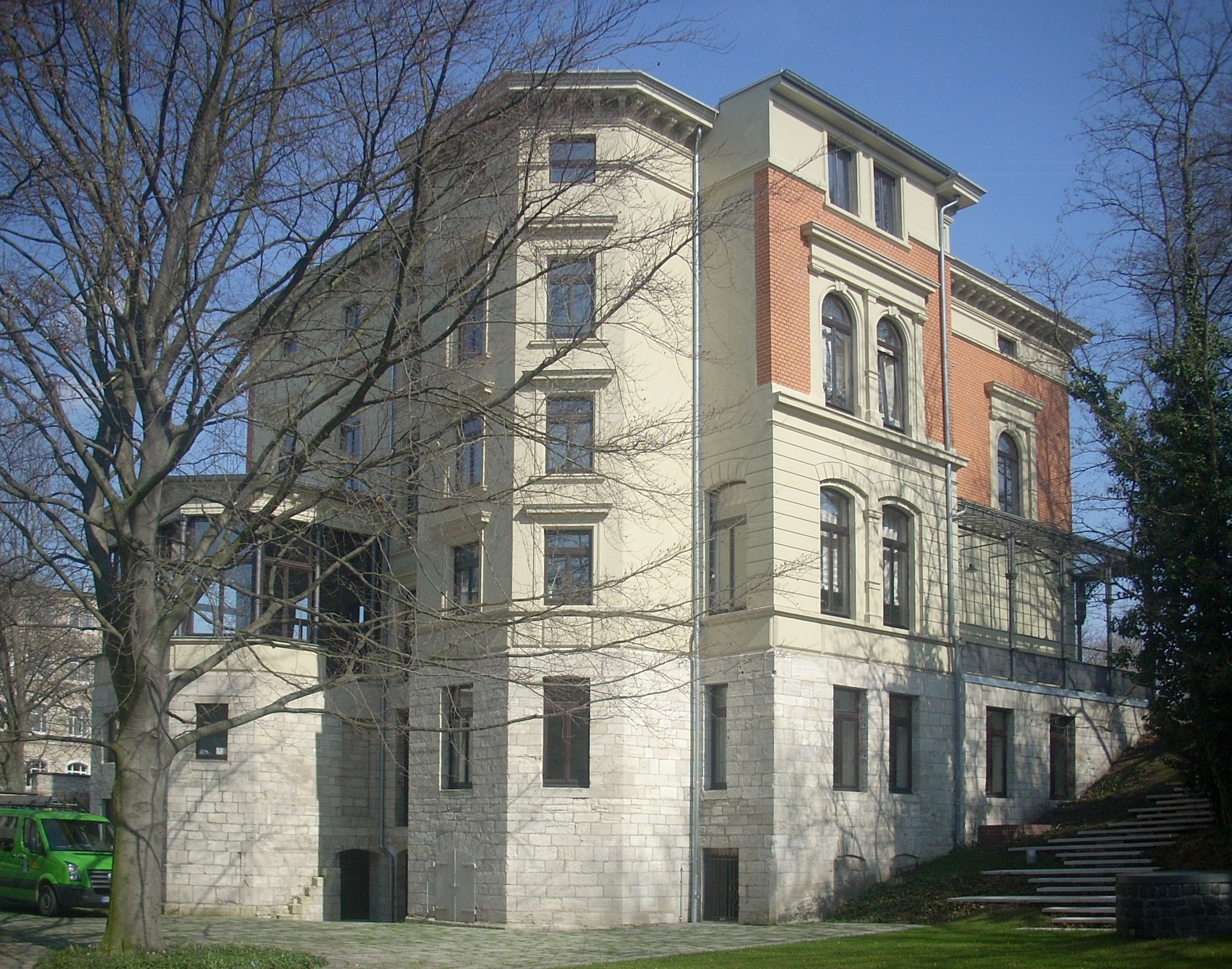 Braunschweig, Villa Gerloff von Südwesten, Rückseite, Garten am Hang zum Magniviertel